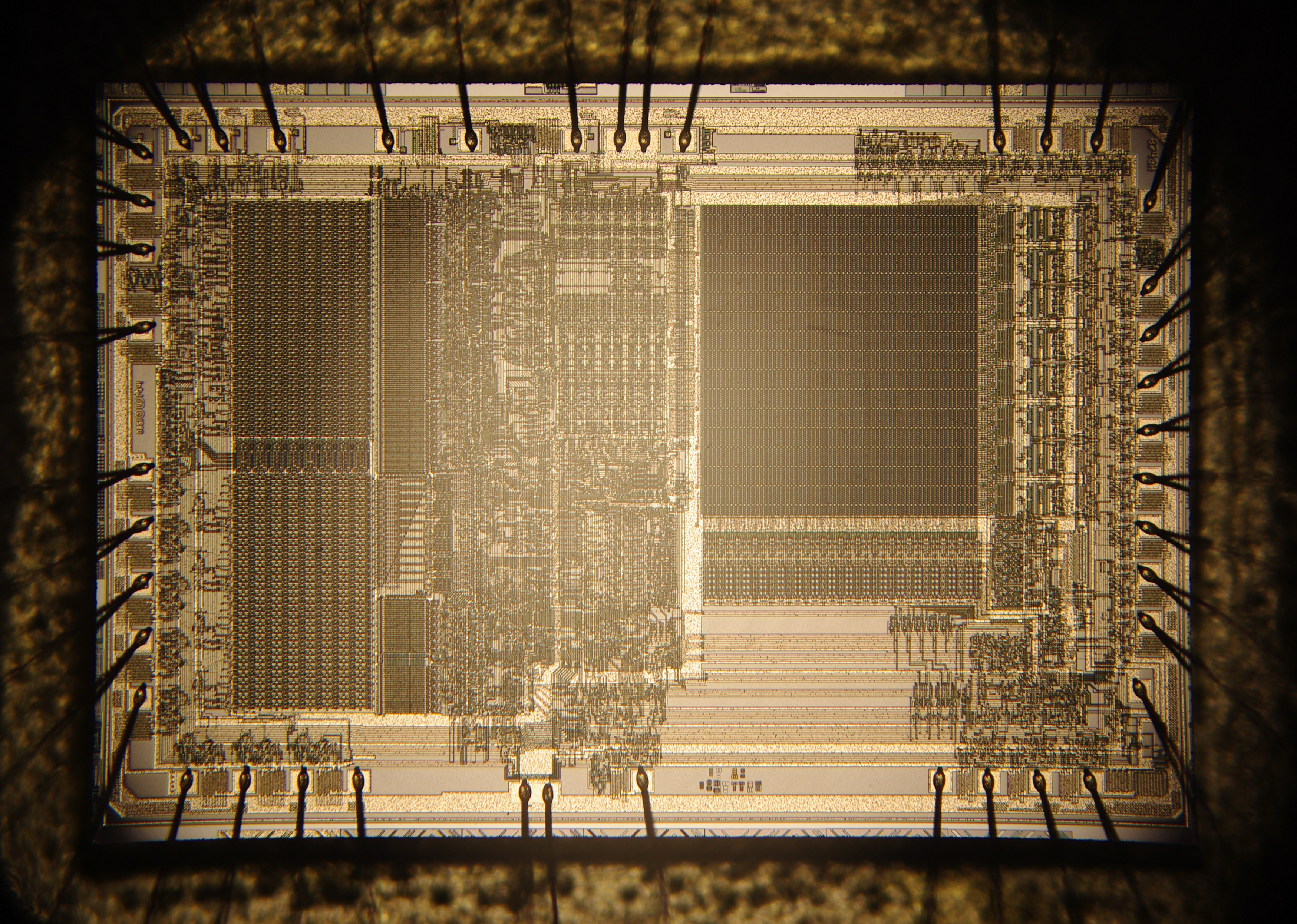 EPROM-Microcontroller Intel 8749H